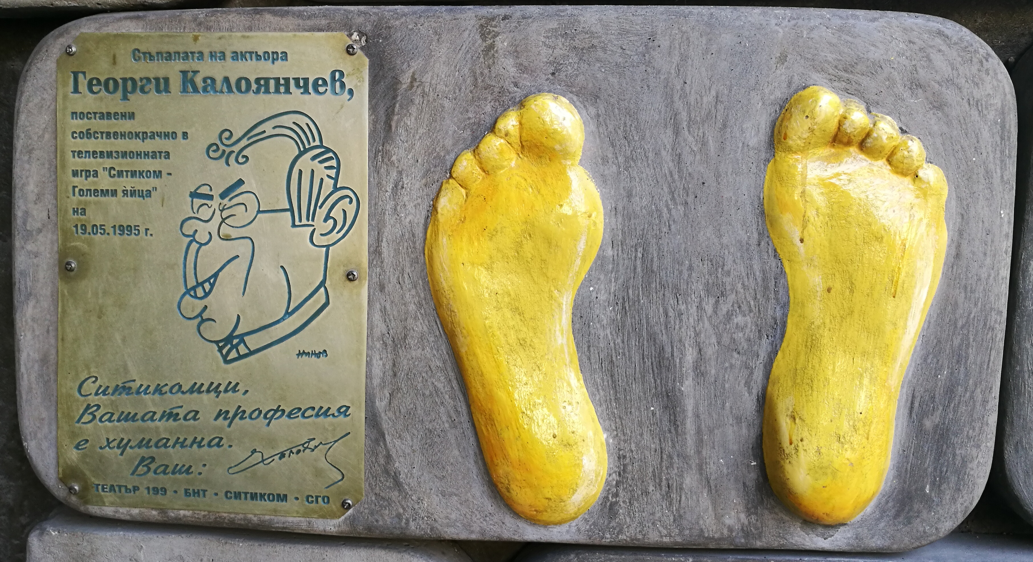 Стената на славата пред Театър 199 - пано с отпечатъци, послание и шарж на Георги Калоянчев.